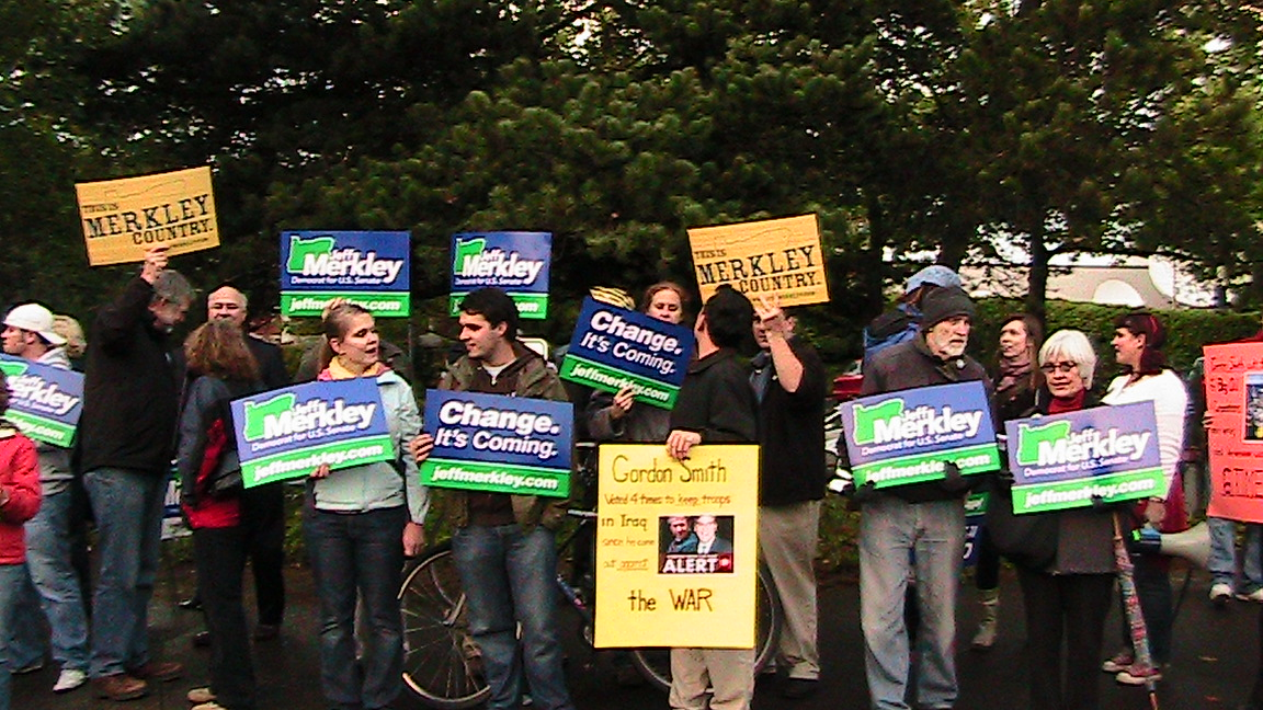 OR: Merkley Rally